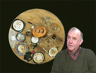 Portrait de Daniel Spoerri